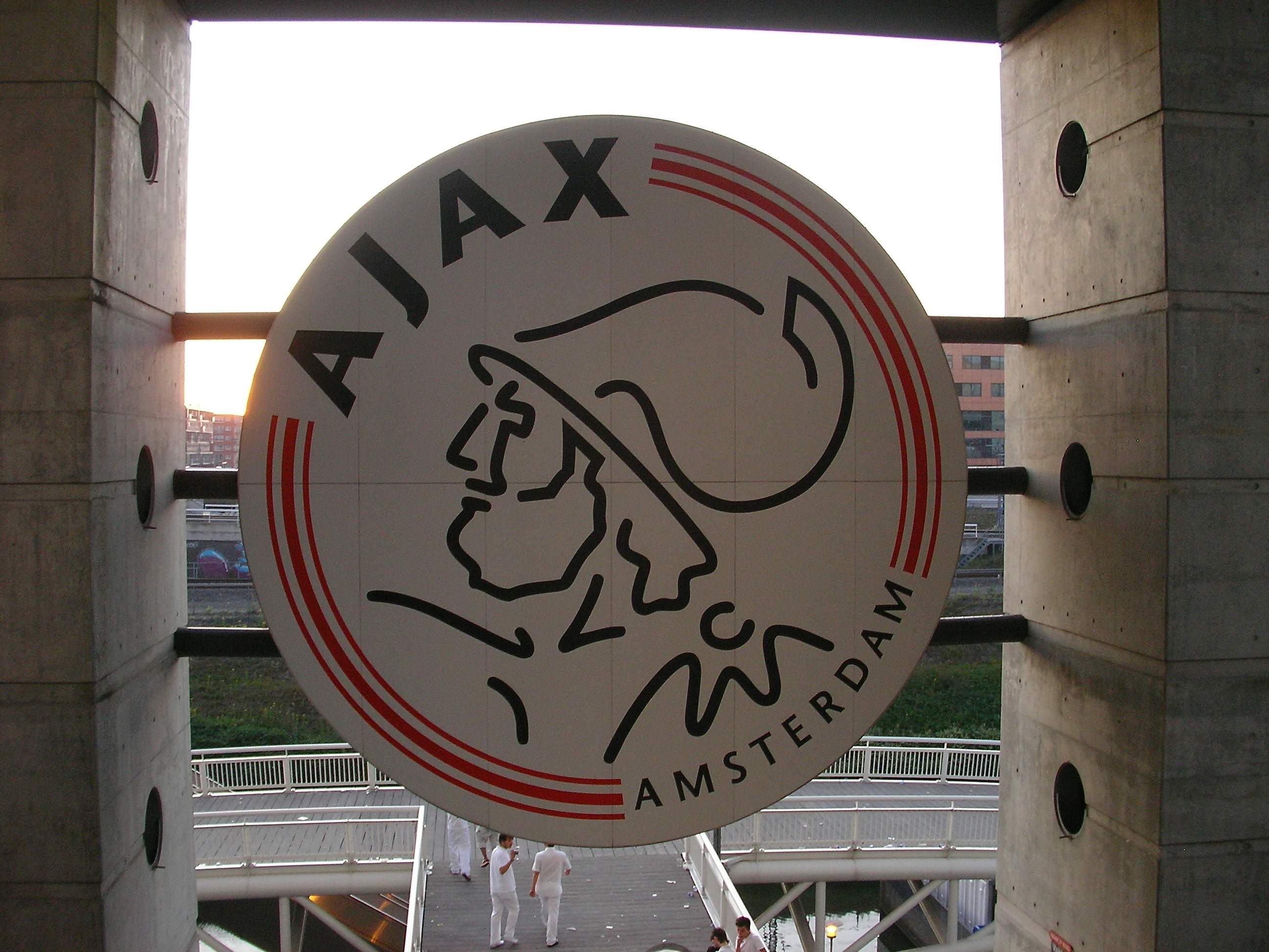 Amsterdam Arena à Amsterdam (Pays-Bas).